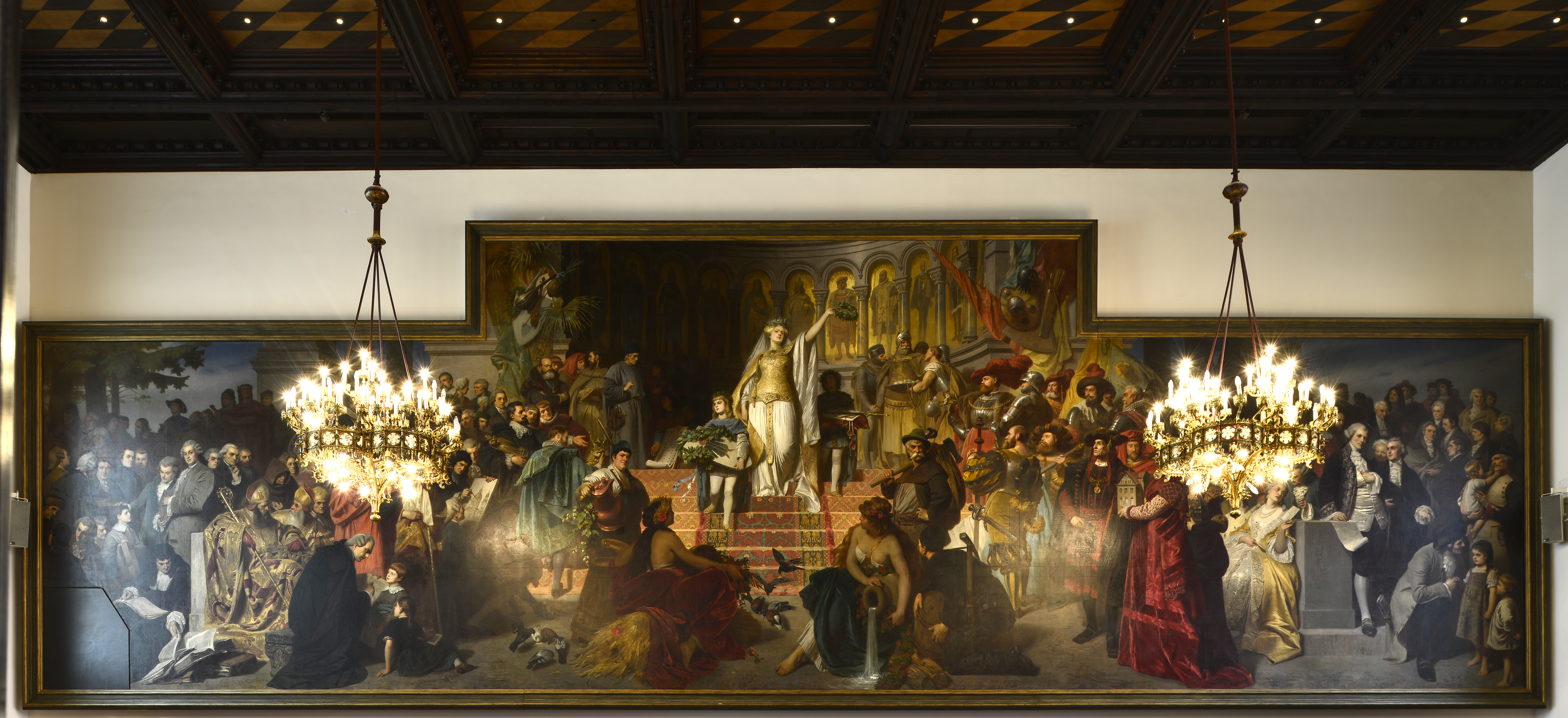 München, Neues Rathaus, im großen Sitzungssaal, Kolossalgemälde “Monachia”.